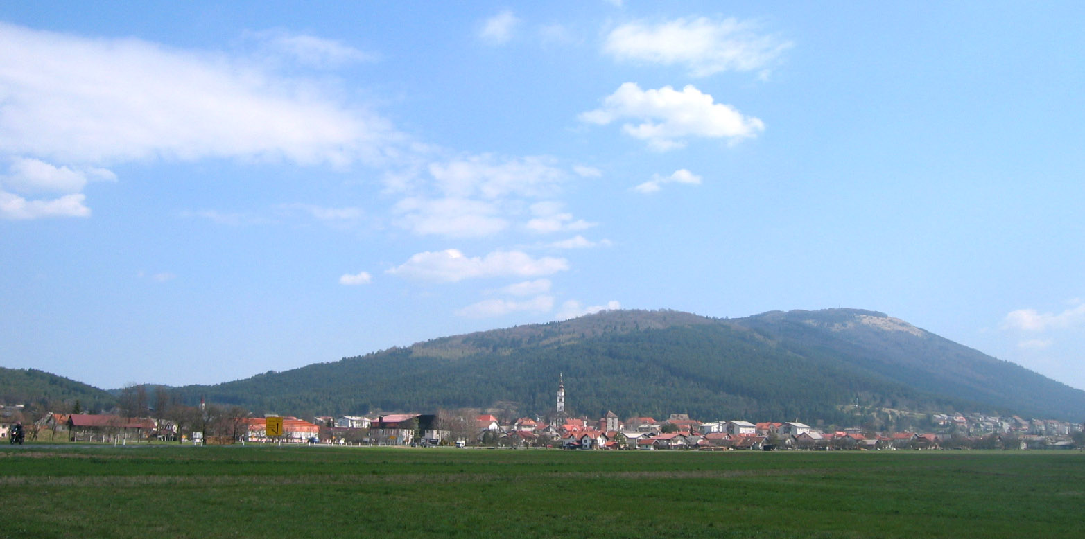 Cerknica, town in Slovenia. photo:Ziga 19:33, 7 April 2007 (UTC)